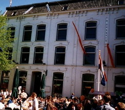 De Pakkerij (datum foto onbekend) is een monumentaal pand aan de Oude Markt, middenin het centrum van Enschede